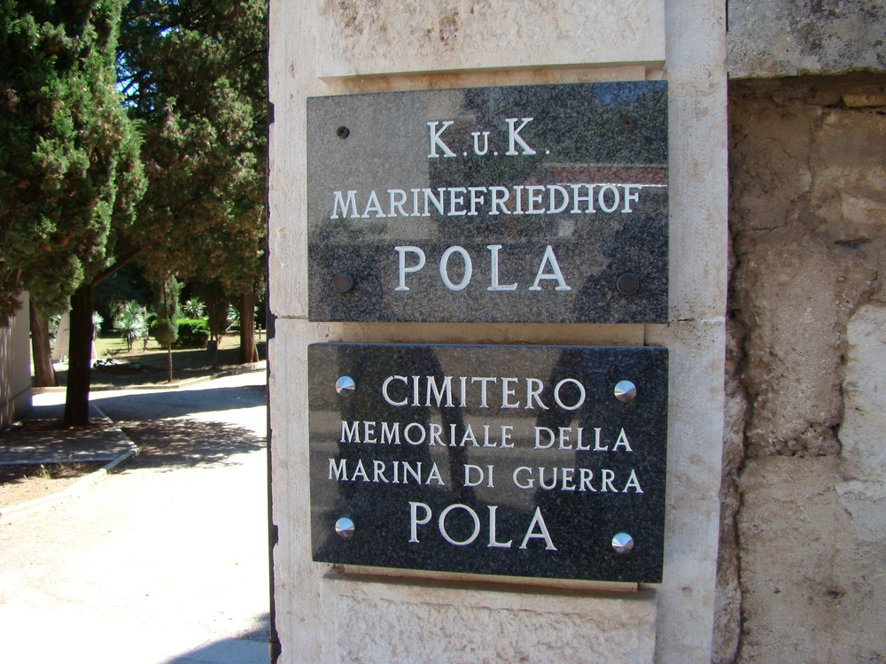 C. i kr. mornaričko groblje u Puli